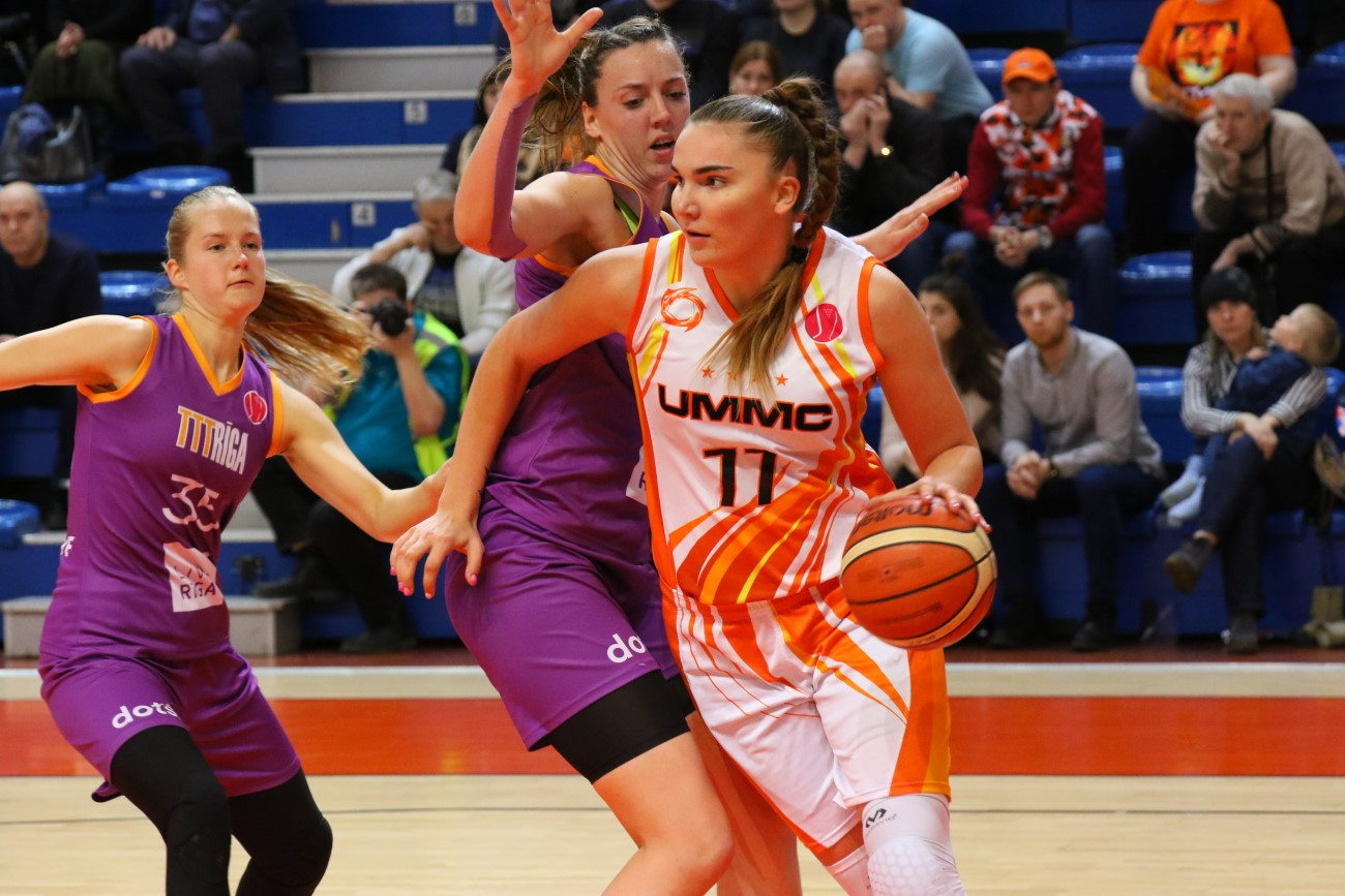 УГМК Екатеринбург – ТТТ Рига (Латвия) 78:45